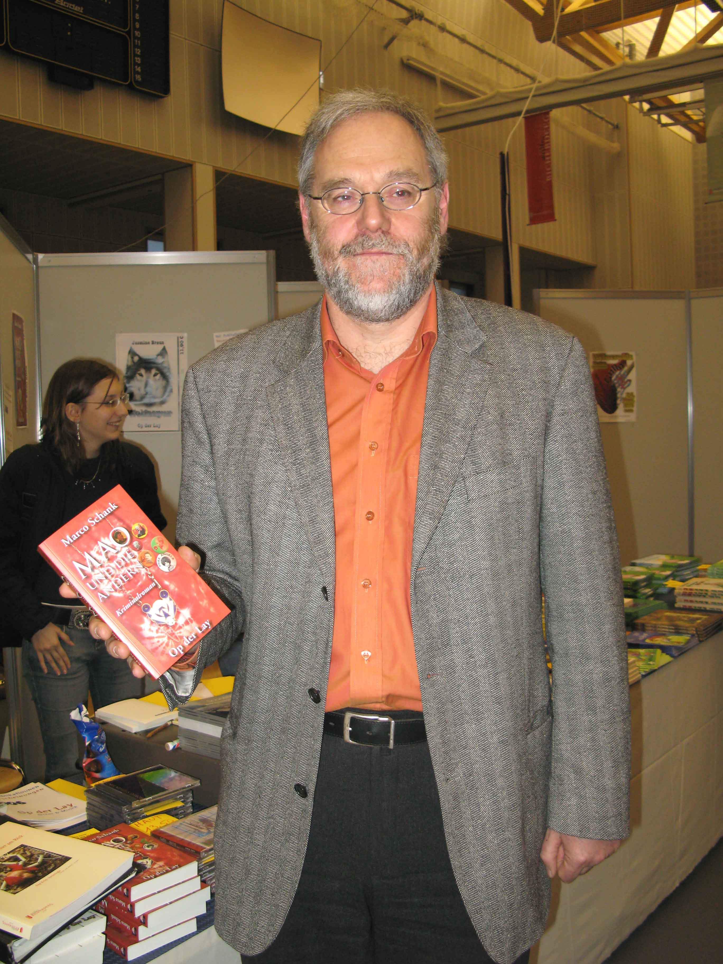 Marco Schank mat Krimi.